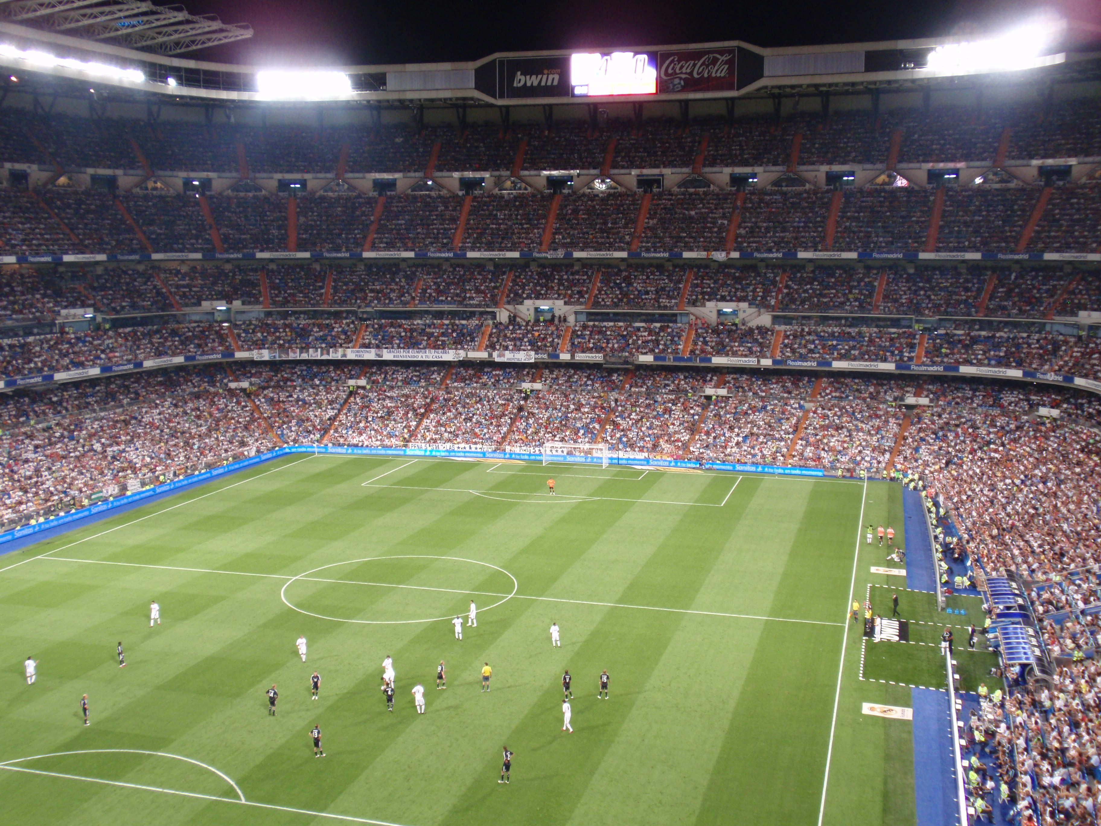 El Estadio Santiago Bernabéu vestido de gala para el XXXI Trofeo Santiago Bernabéu, que enfrentó a Real Madrid y Rosenborg.